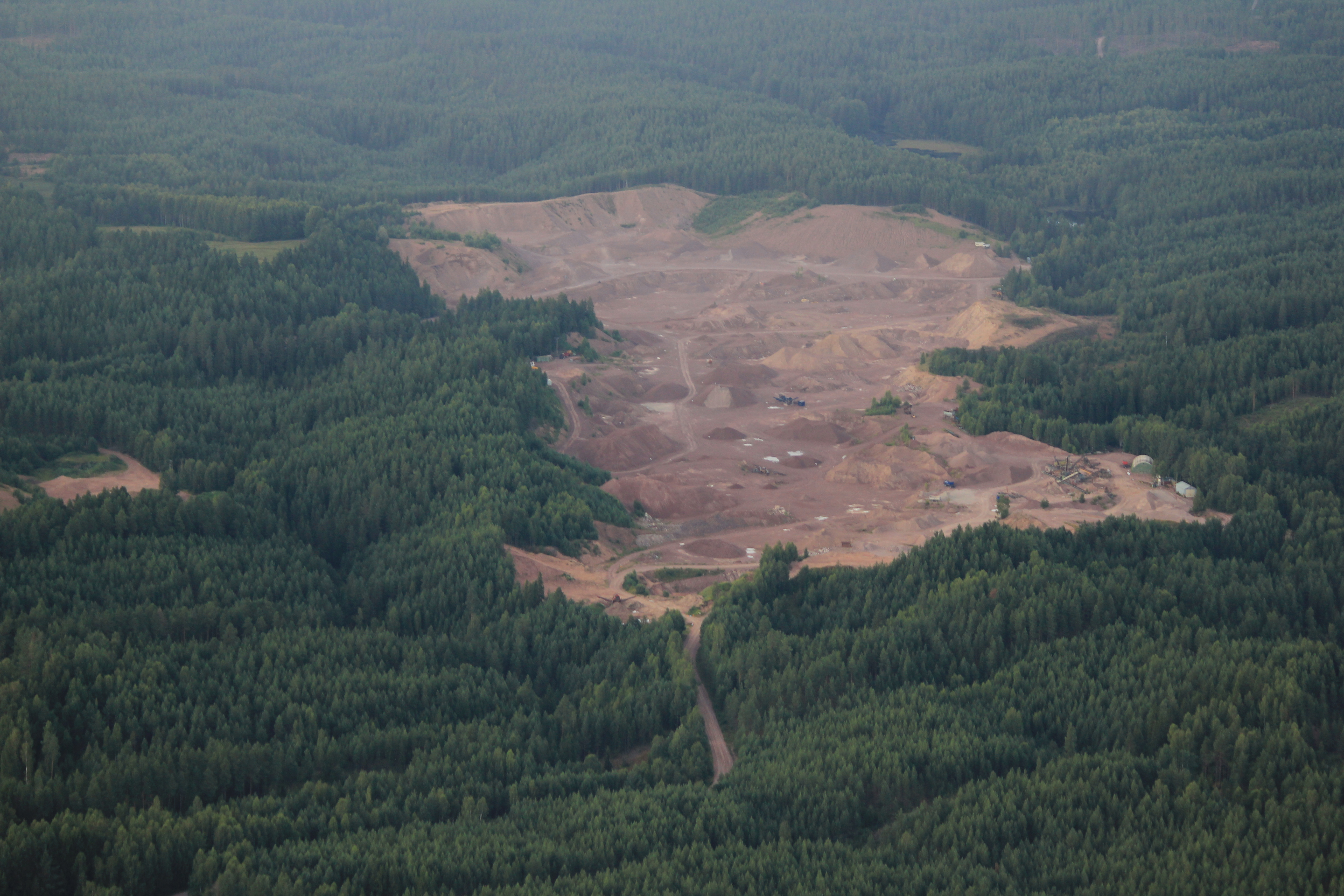 Flygfoto över sandtaget i Gräv/Ål-kilen, Gagnefs kommun, Dalarnas län, Sverige This aerial photograph has been approved for publishing by the Swedish Armed Forces with the ID: FMTM 10 830:11043 This tag does not indicate the copyright status of the attached work. A normal copyright tag is still required. See Commons:Licensing for more information.